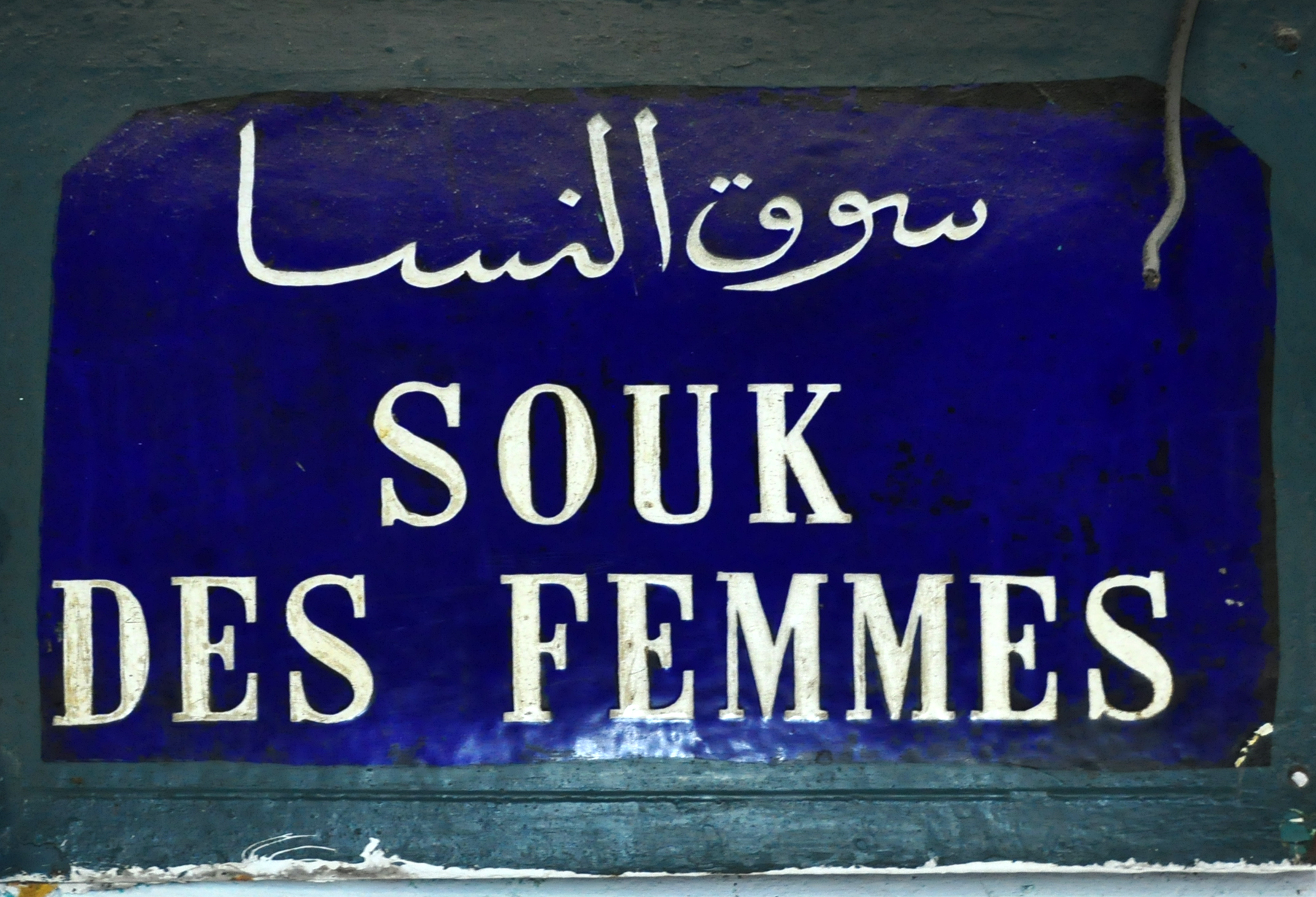 souk des femmes , la médina